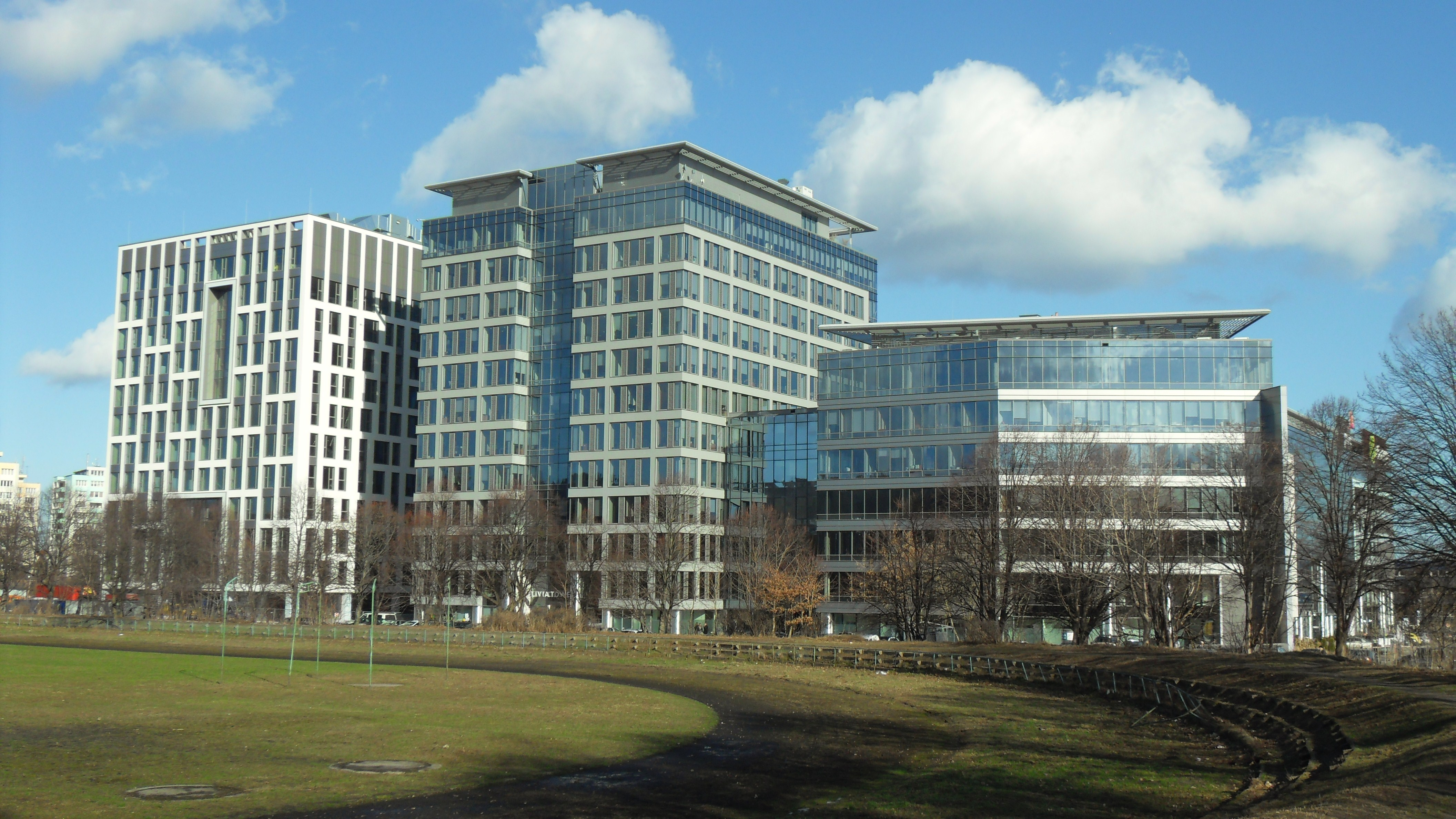 Gdańsk Oliwa, "Olivia Business Centre".